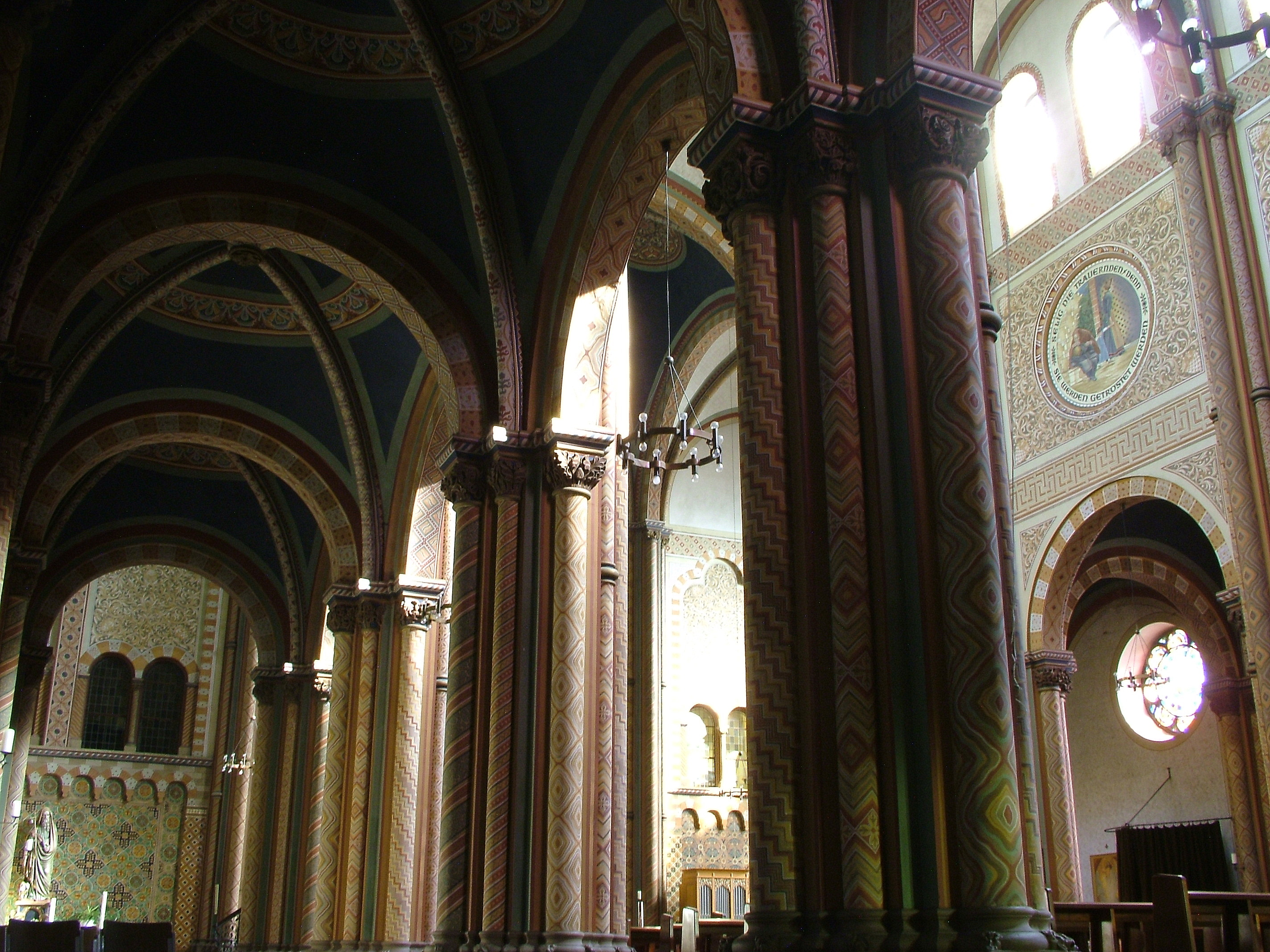 Anholt (Isselburg), St. Pankraz